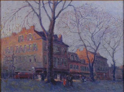 Lafayette Park Scene